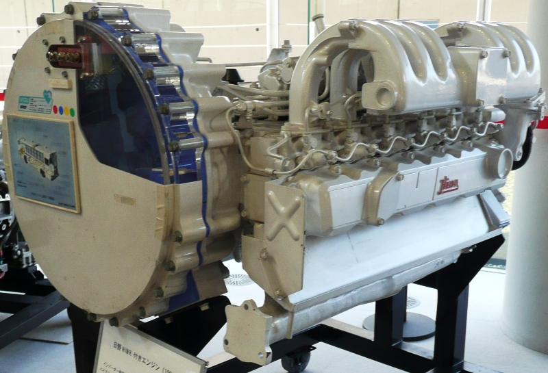 Hino M10U engine.